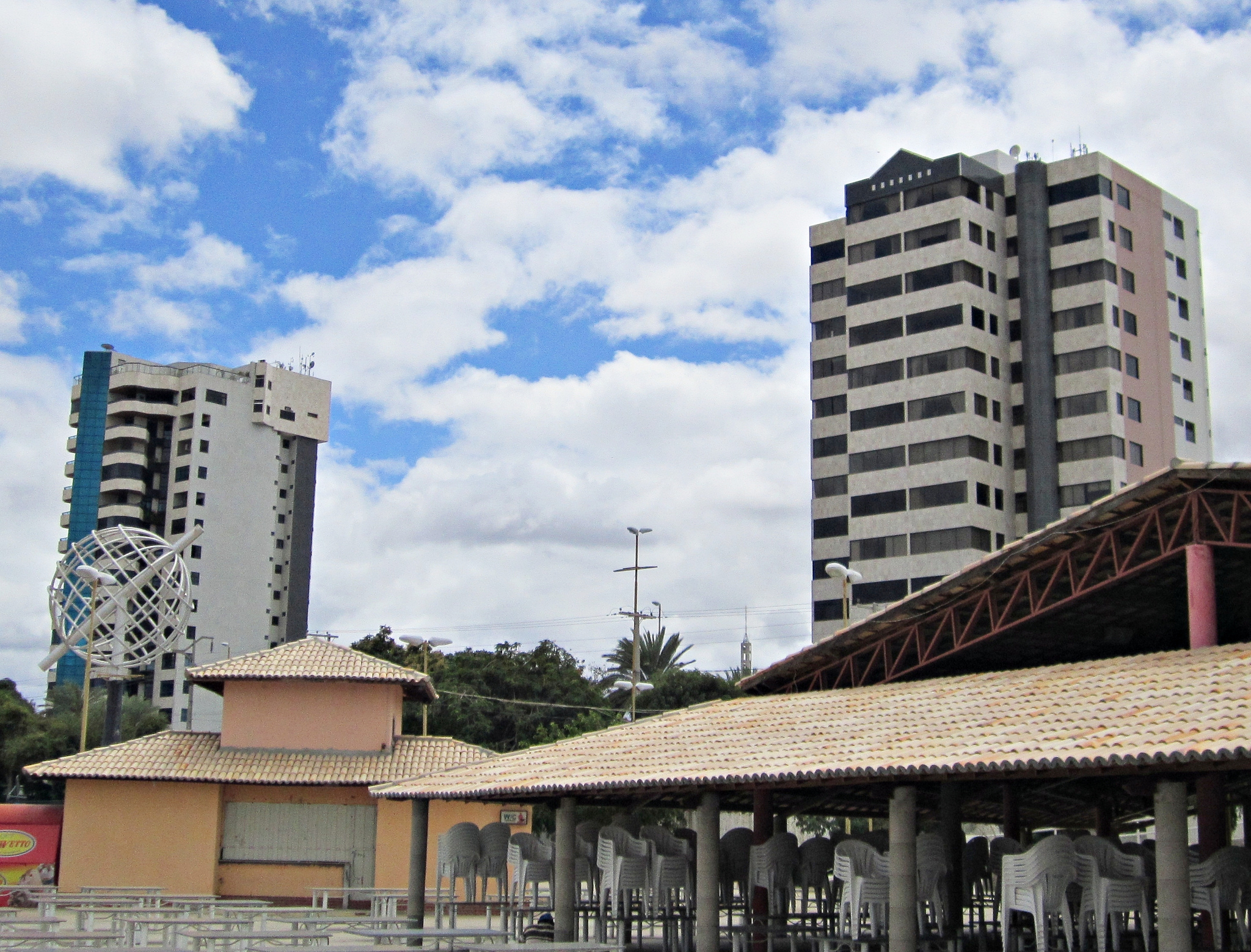 Orla I - Petrolina, Pernambuco, Brasil